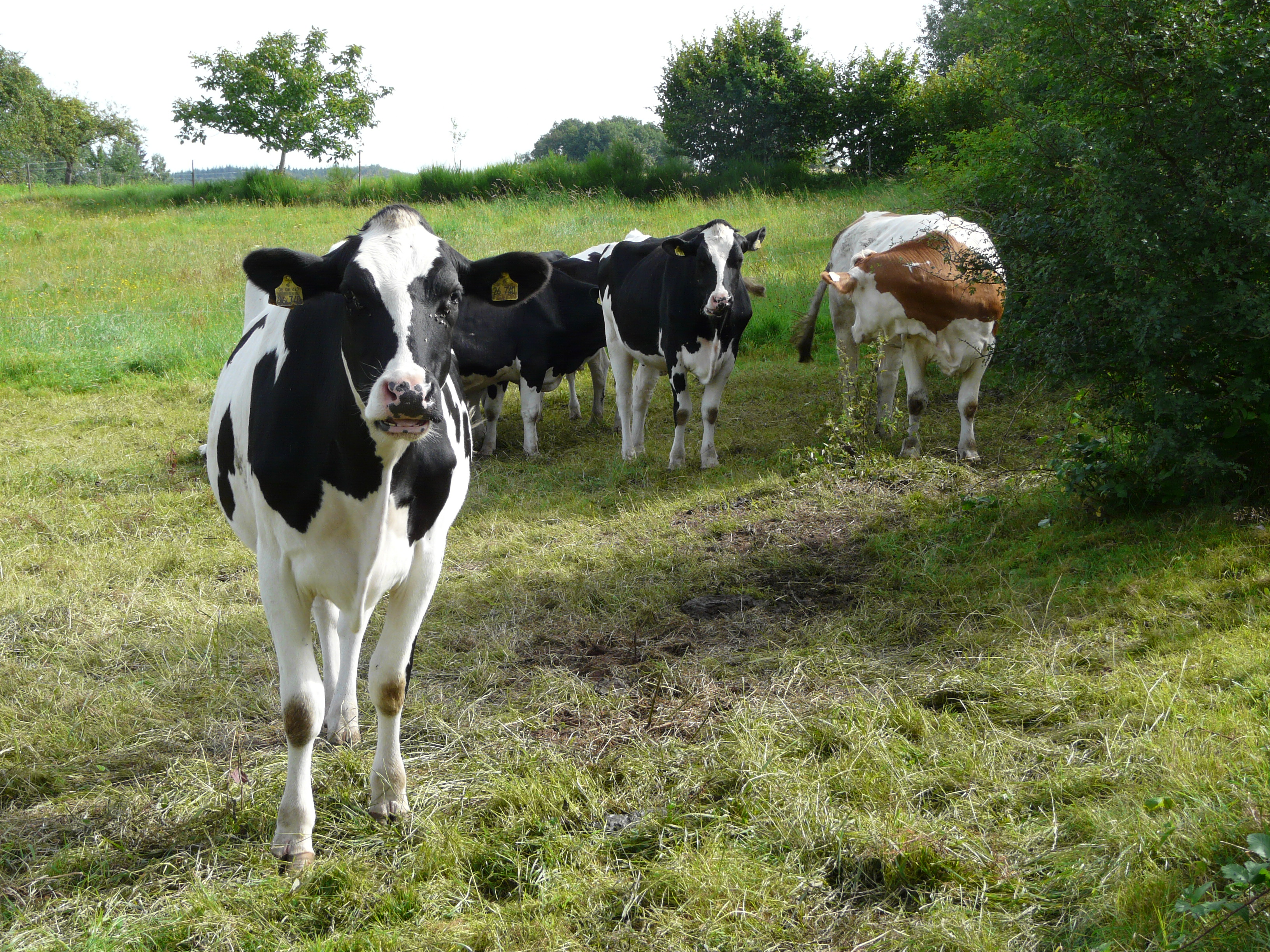 Die „neuen Bewohner“ des Numeruskastells Hesselbach an der Porta Principalis Dextra